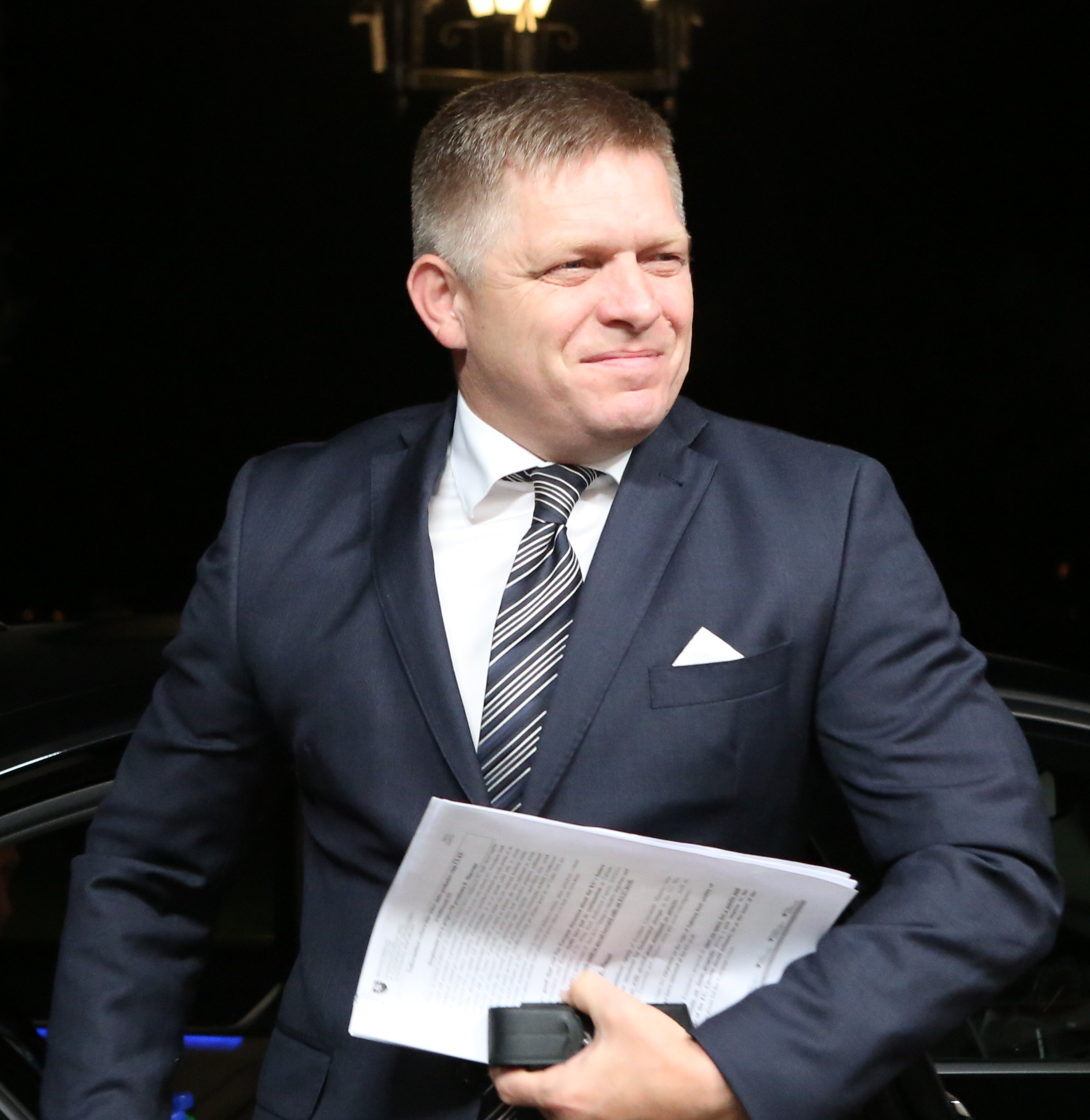 Photo: Annika Haas (EU2017EE)